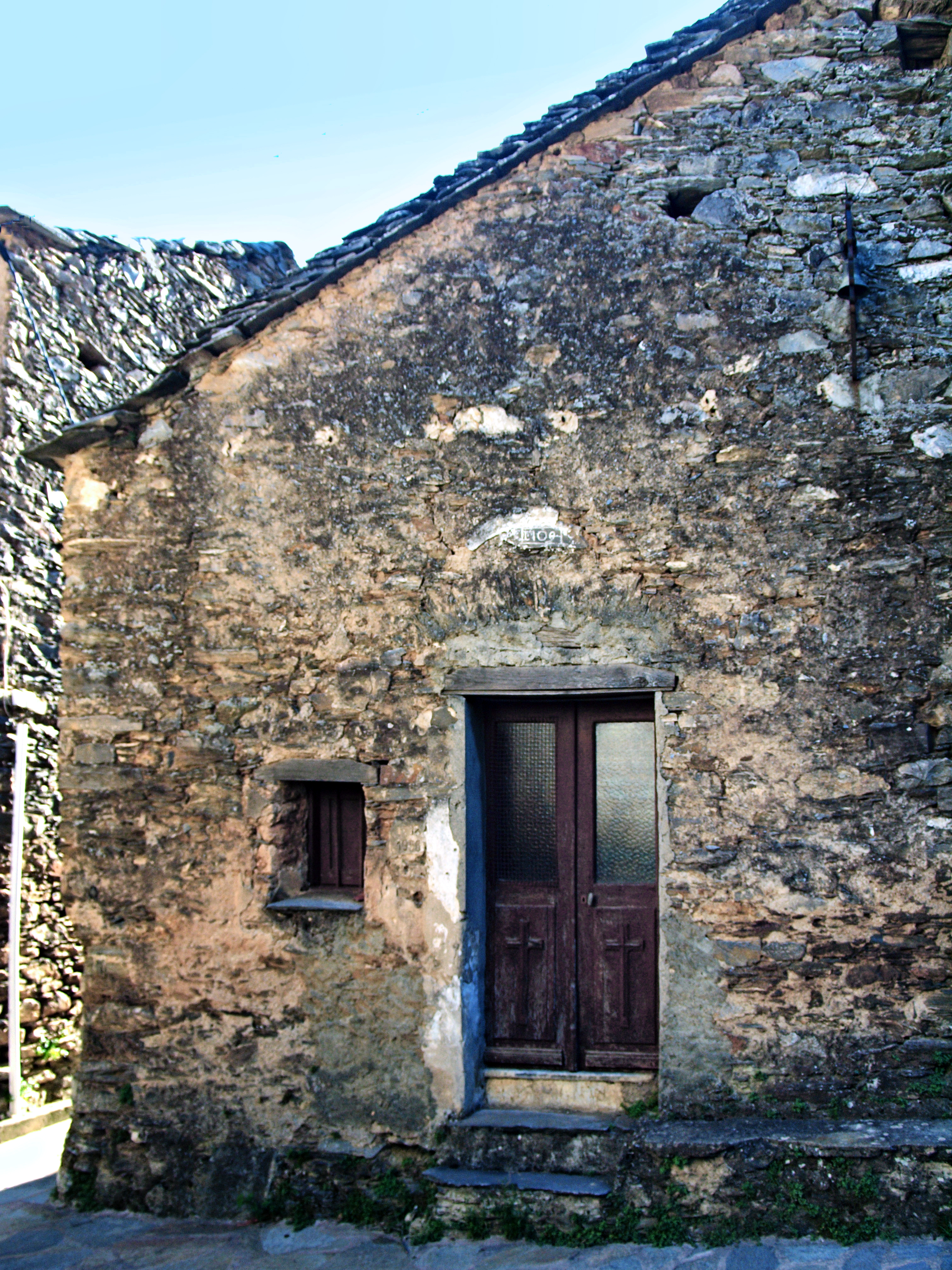 Penta-Acquatella, Castagniccia (Corse) - Chapelle Saint-Pascal Baylon (1934) au cœur du village